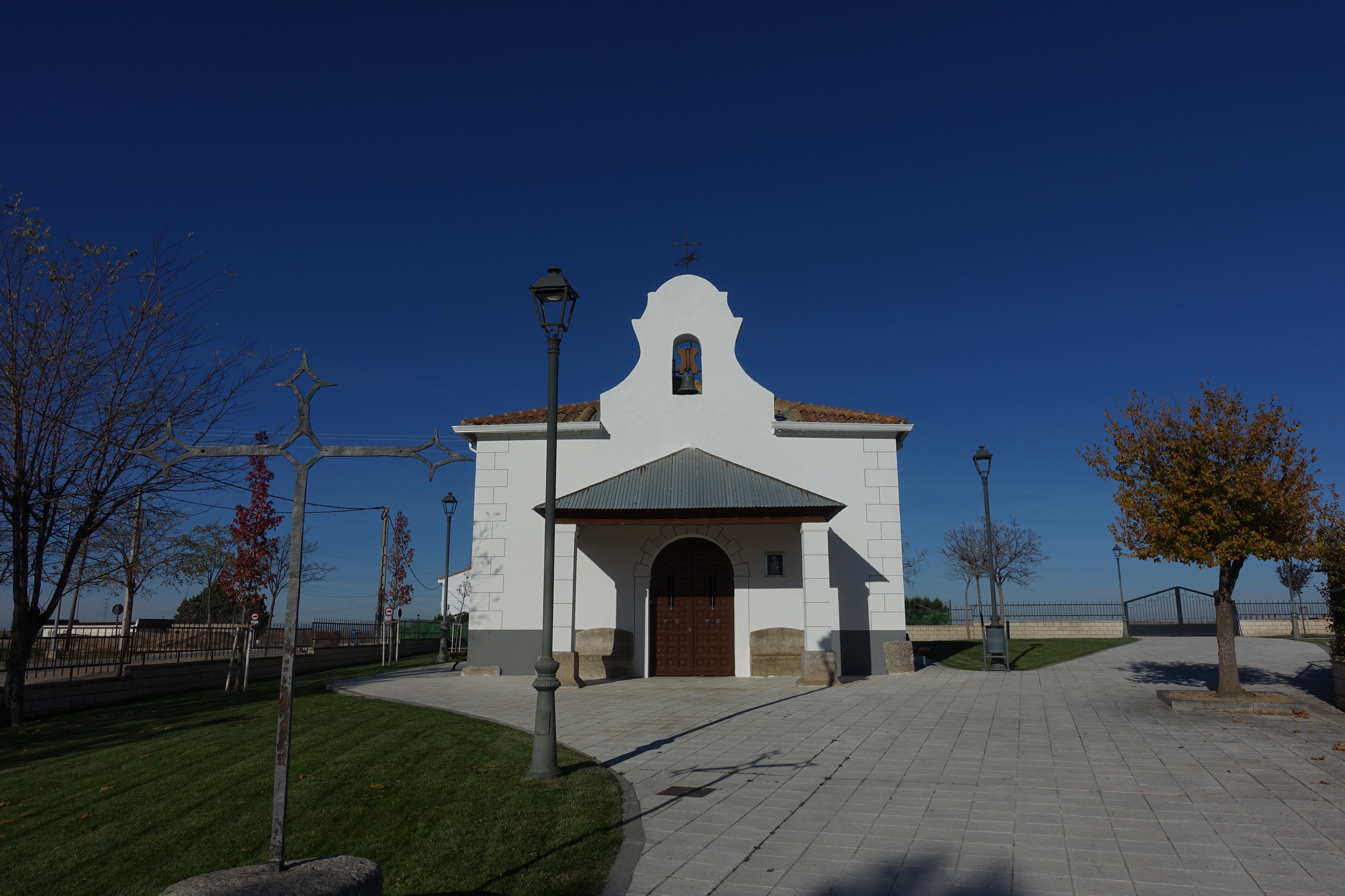 Ermita de la Piedad, Garcillán (Segovia, España).